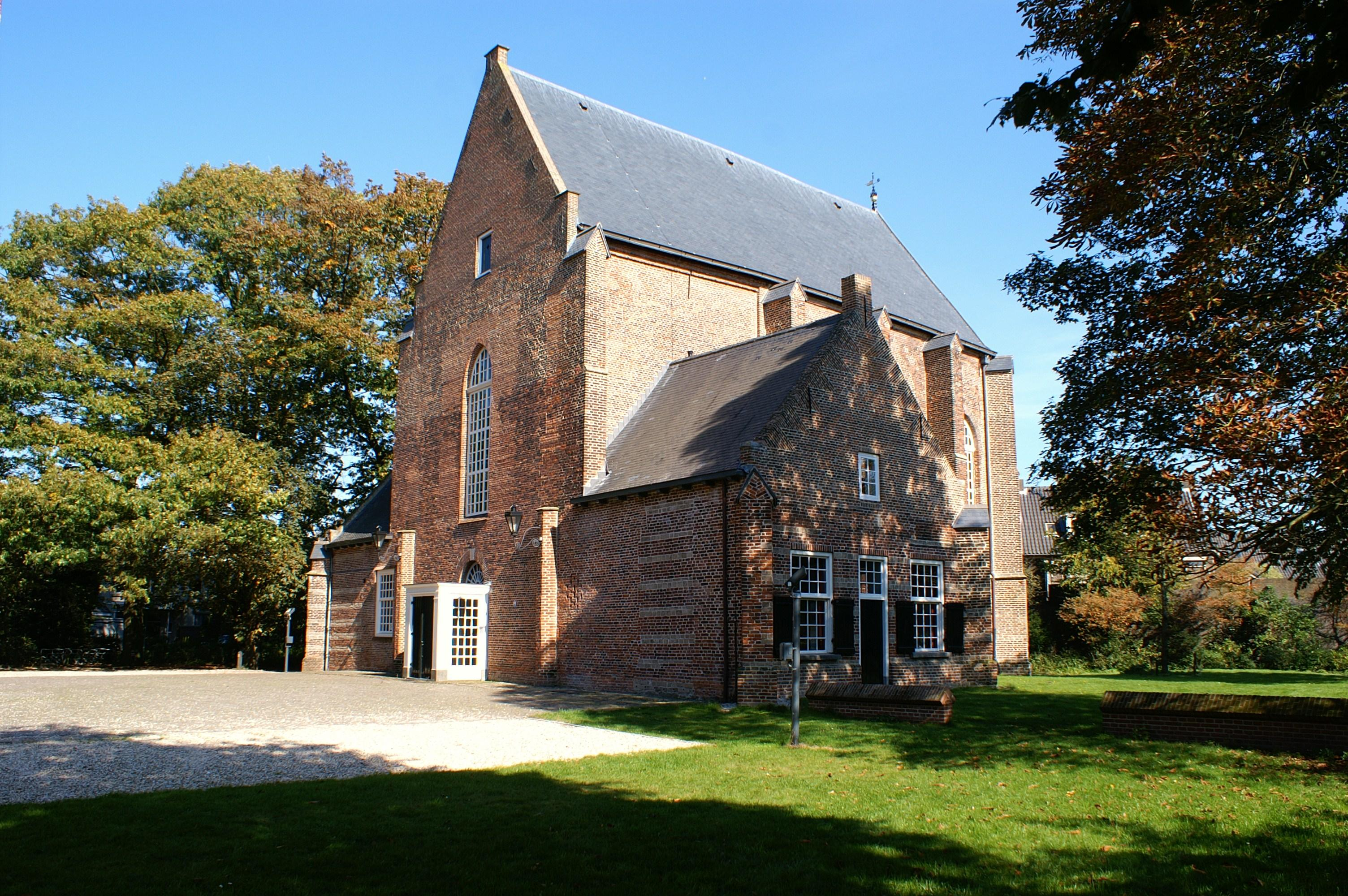 Nederlands Hervormde kerk te Vught.